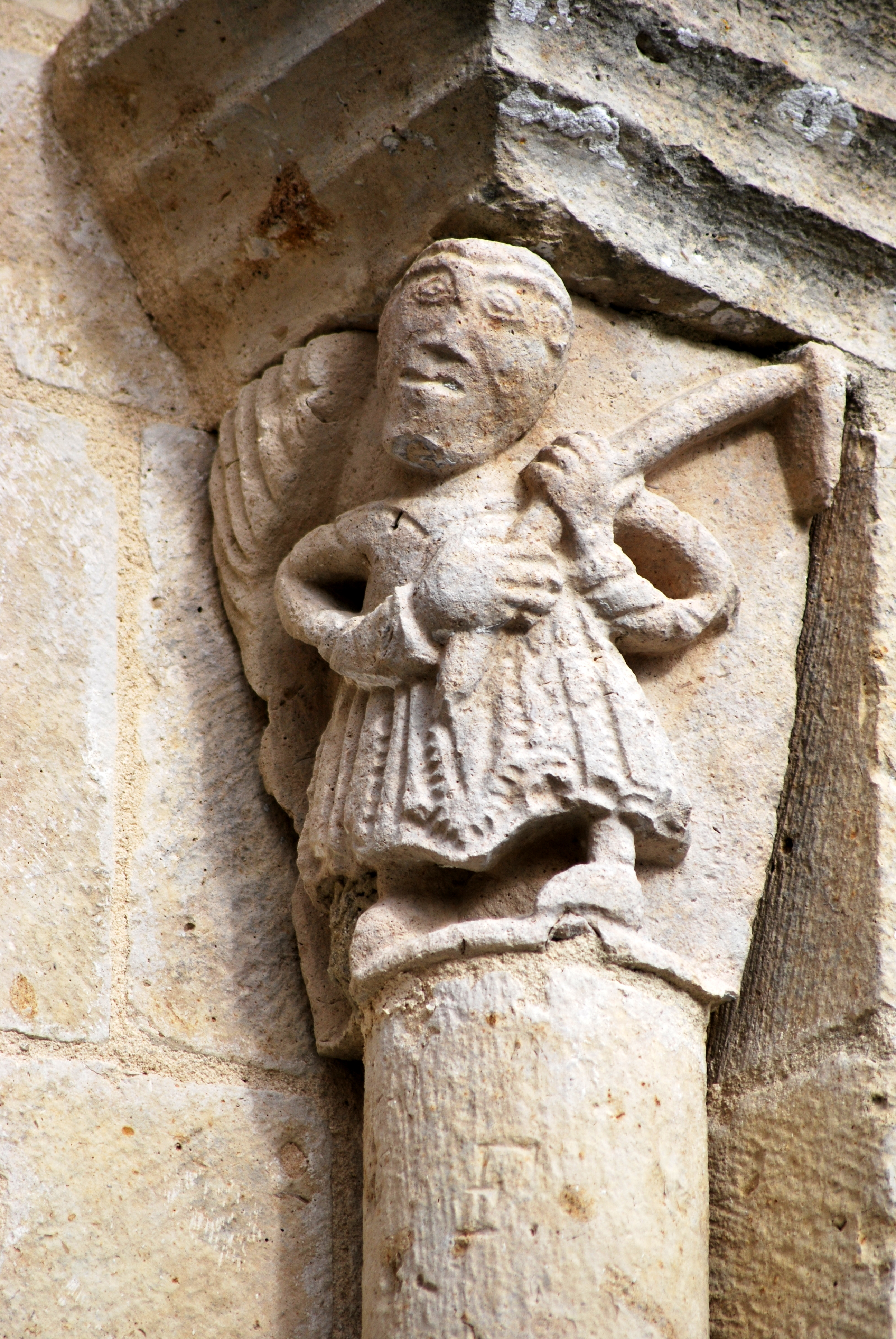 Église Saint-Martin de Landiras